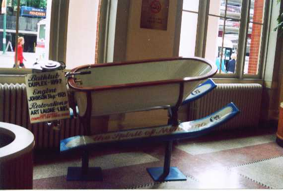 Rennbadewanne, fotografiert in Vancouver, soweit ich mich erinnere ...